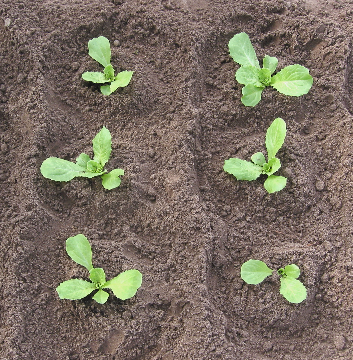 (Andijvie 4 weken na zaaien) (Cichorium endivia 4 weeks after sowing